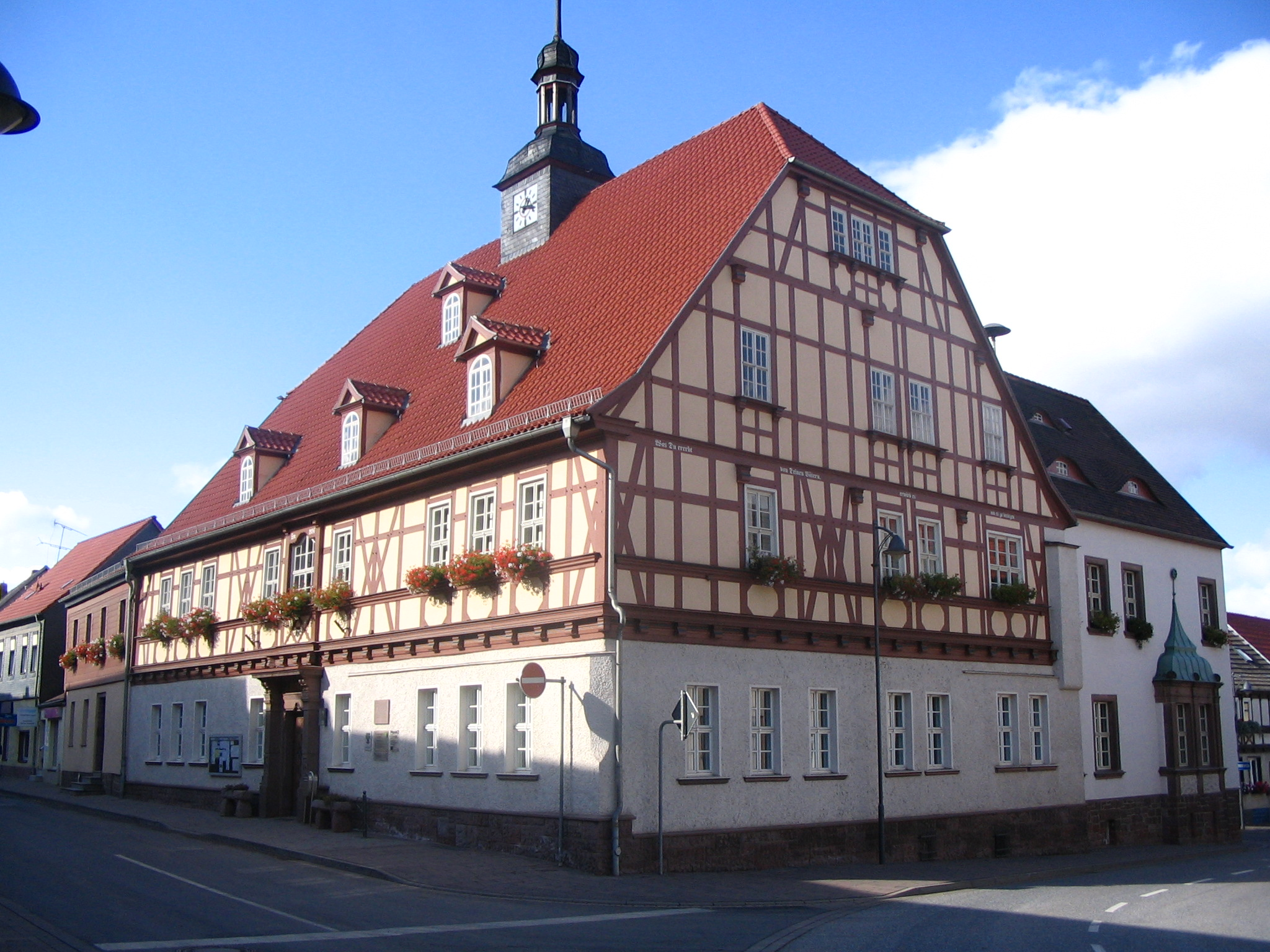 Rathaus der Stadt Kelbra